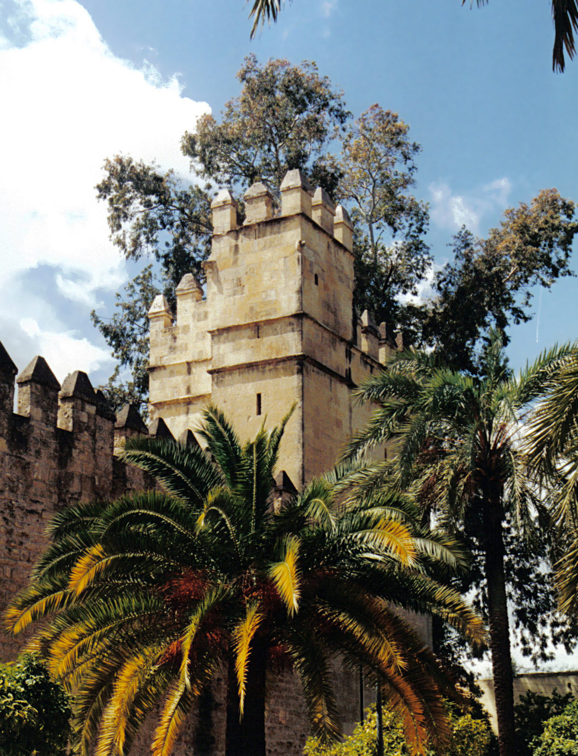 Cordoue - Alcazar mudéjar d'Alphonse XI